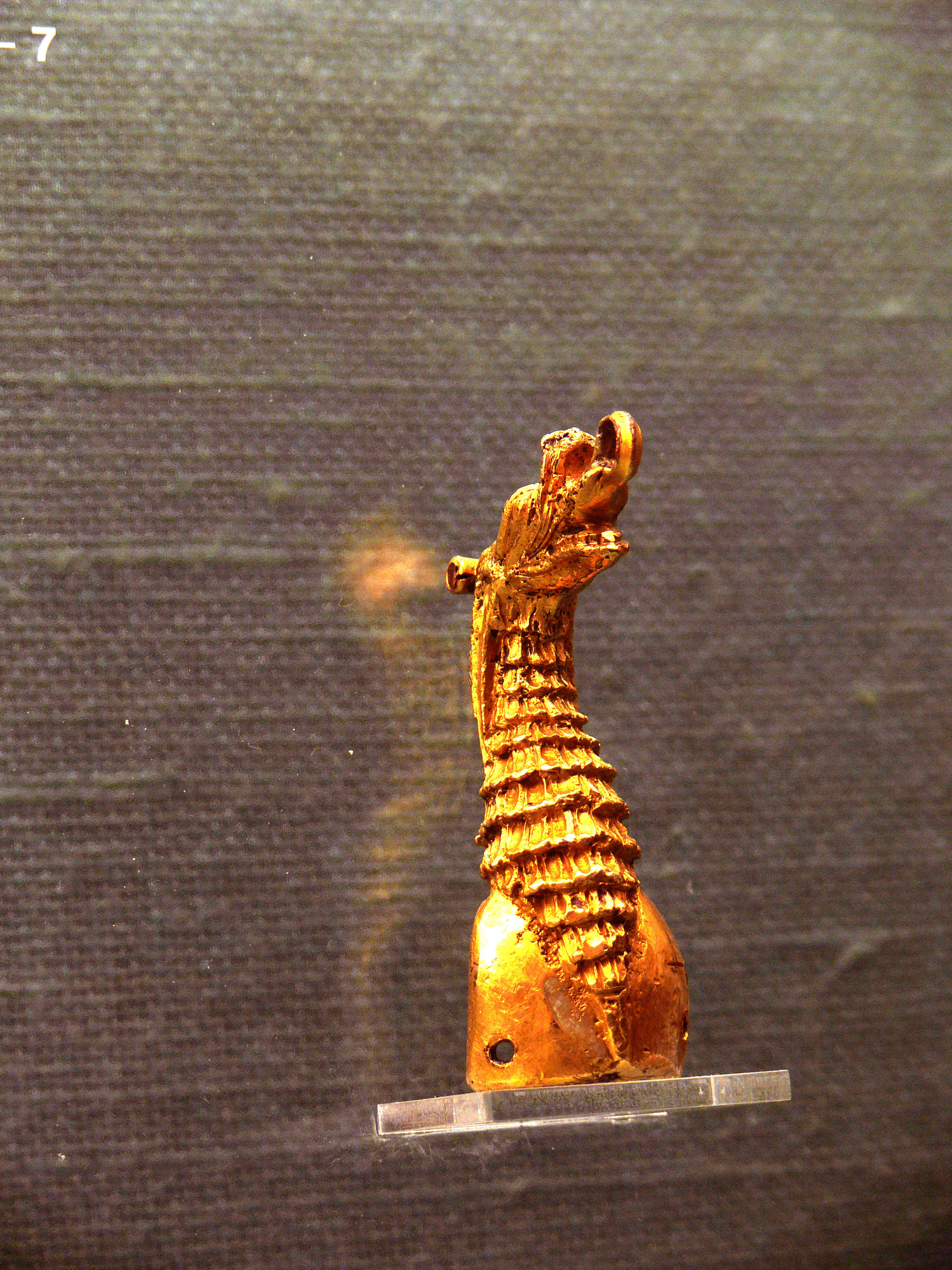 Feuervergoldeter Drachenkopf aus Irland, der in einem Wikingergrab in Stavanger (Norwegen) gefunden wurde. Museum Kopenhagen.